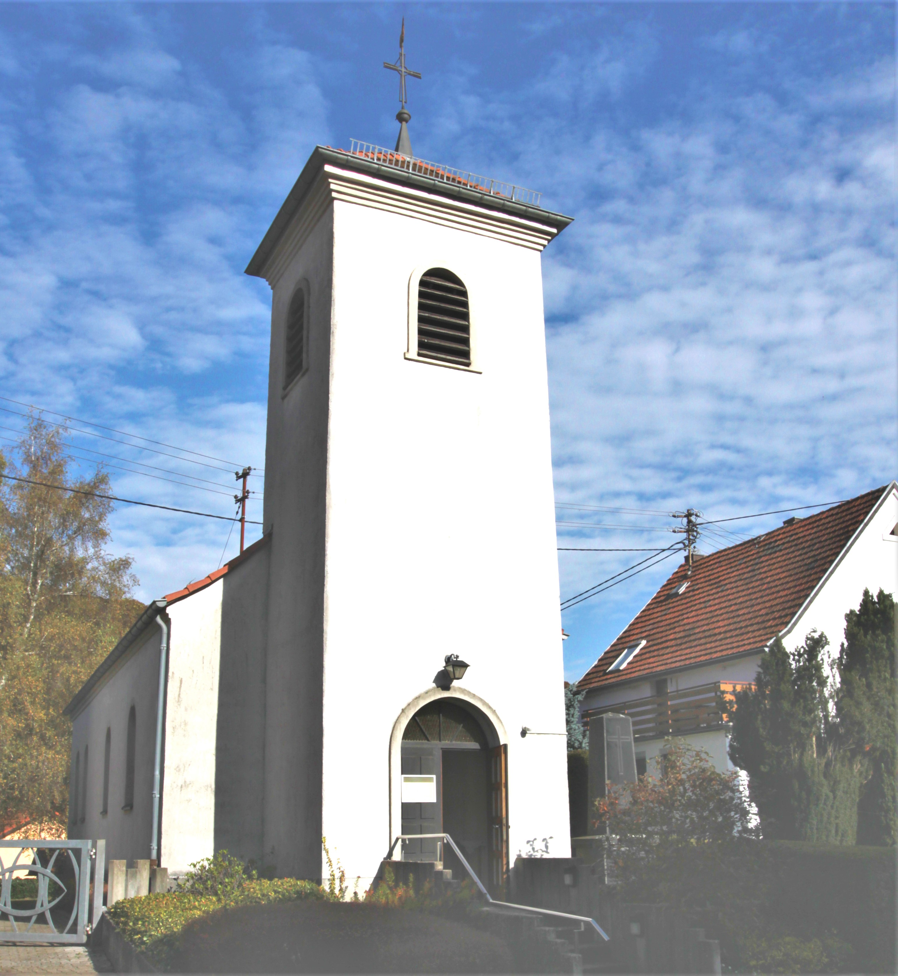 Kirche Maria Königin, Merzig Weiler, Baudenkmal